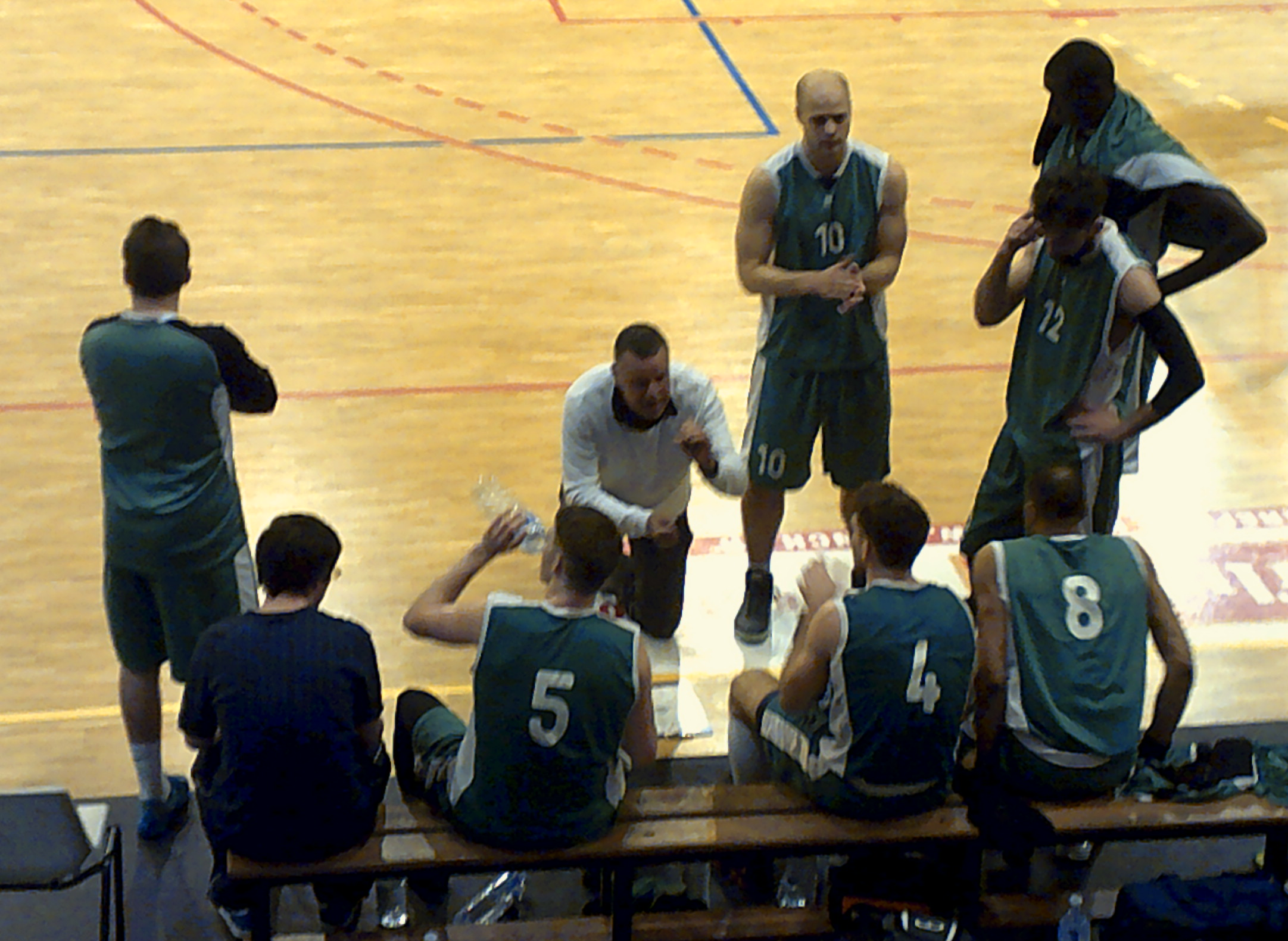 Rencontre de NM2 (Template:4e division) entre CEP Lorient - ASA Sceaux, salle Kervaric, 18 avril 2015